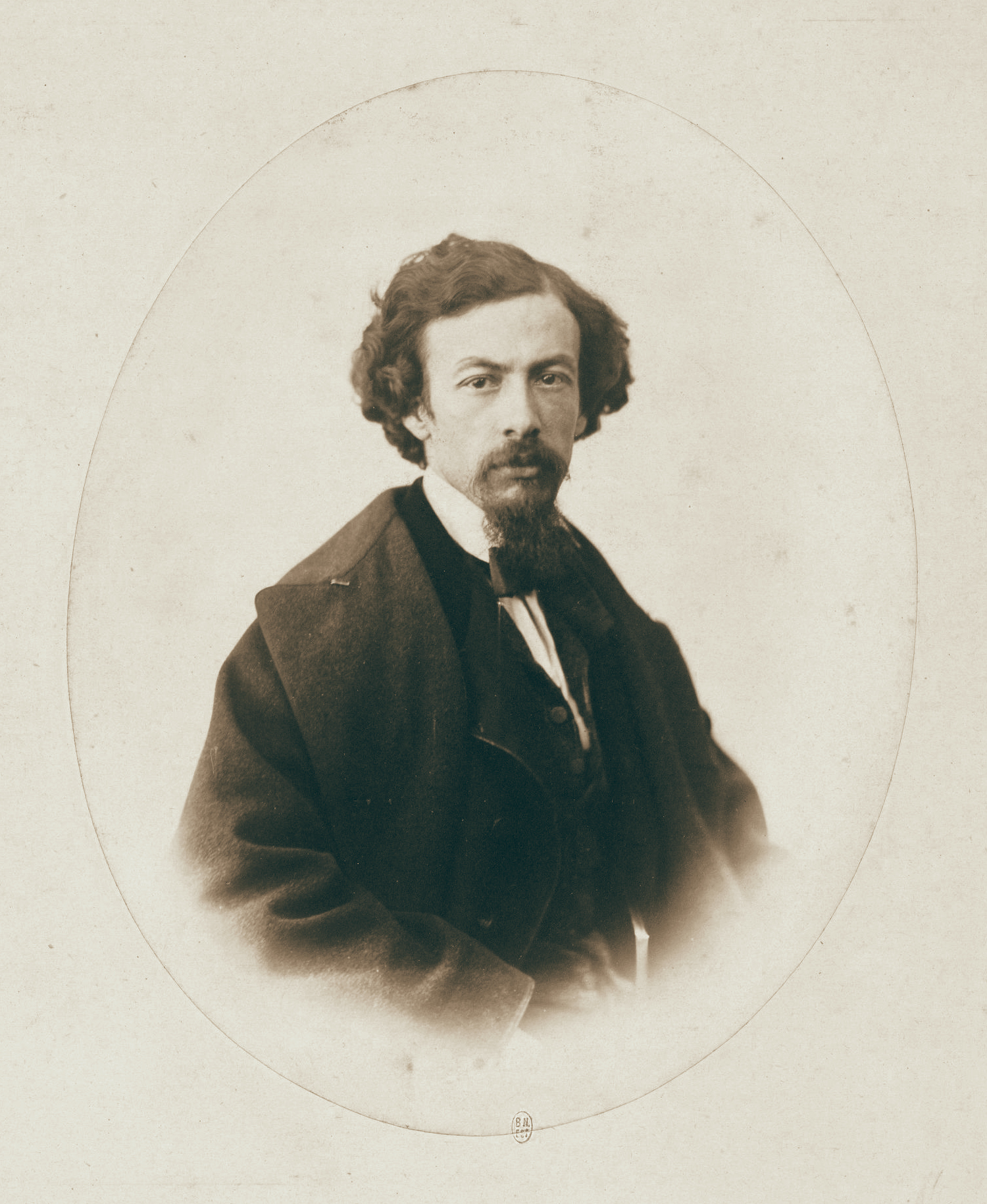 Autoportrait Gustave Le Gray, vers 1856-1859